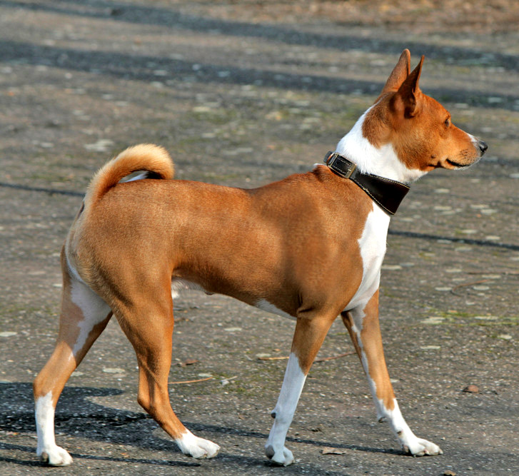 camminare da... basenji